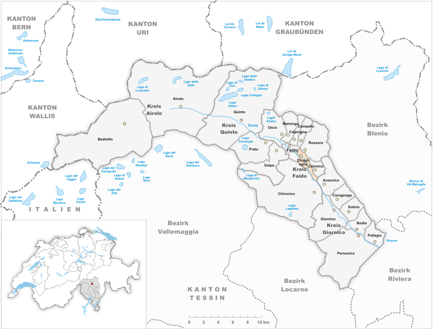 Municipality Chiggiogna